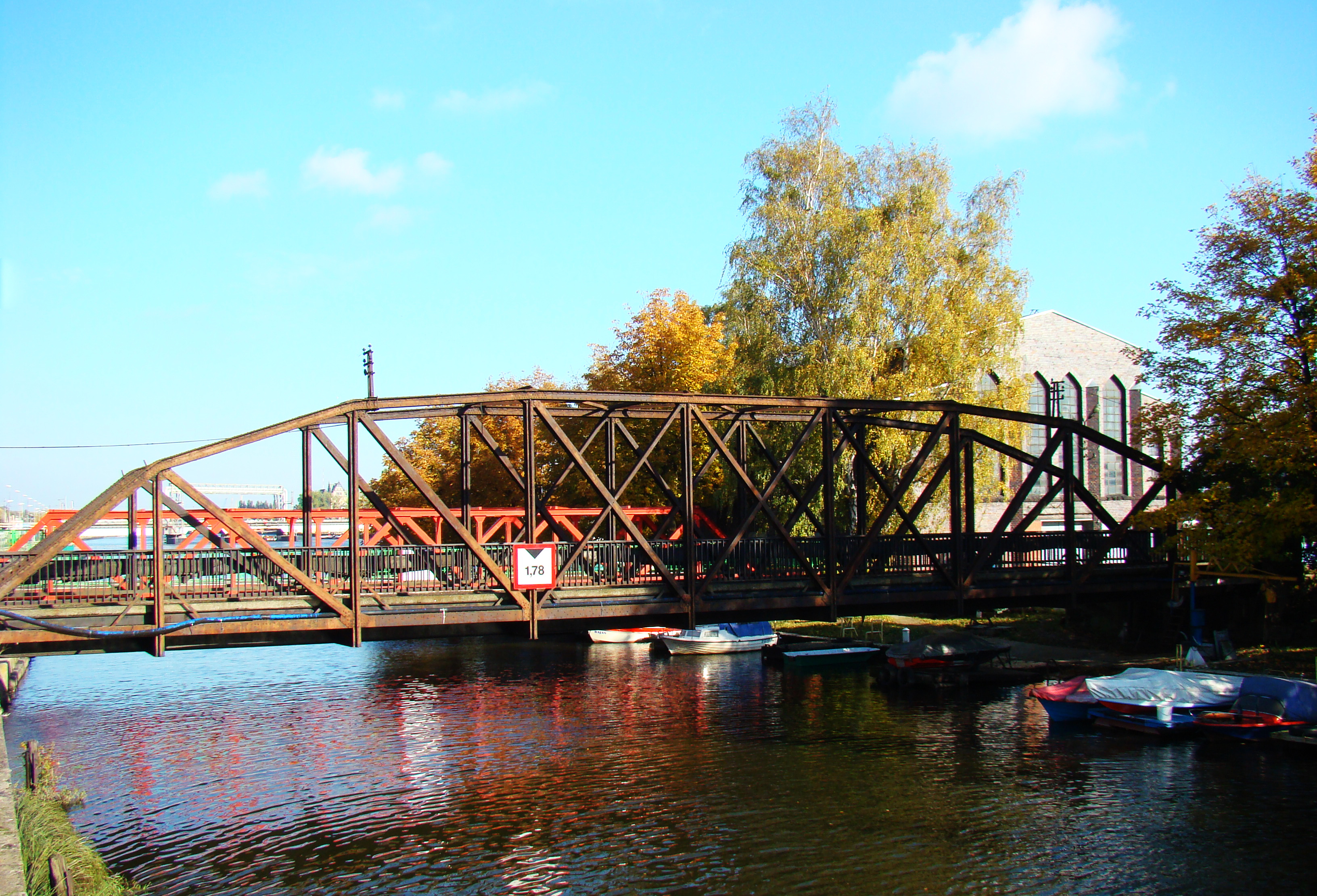 Most na Wyspę Jaskółczą, Szczecin, Polska